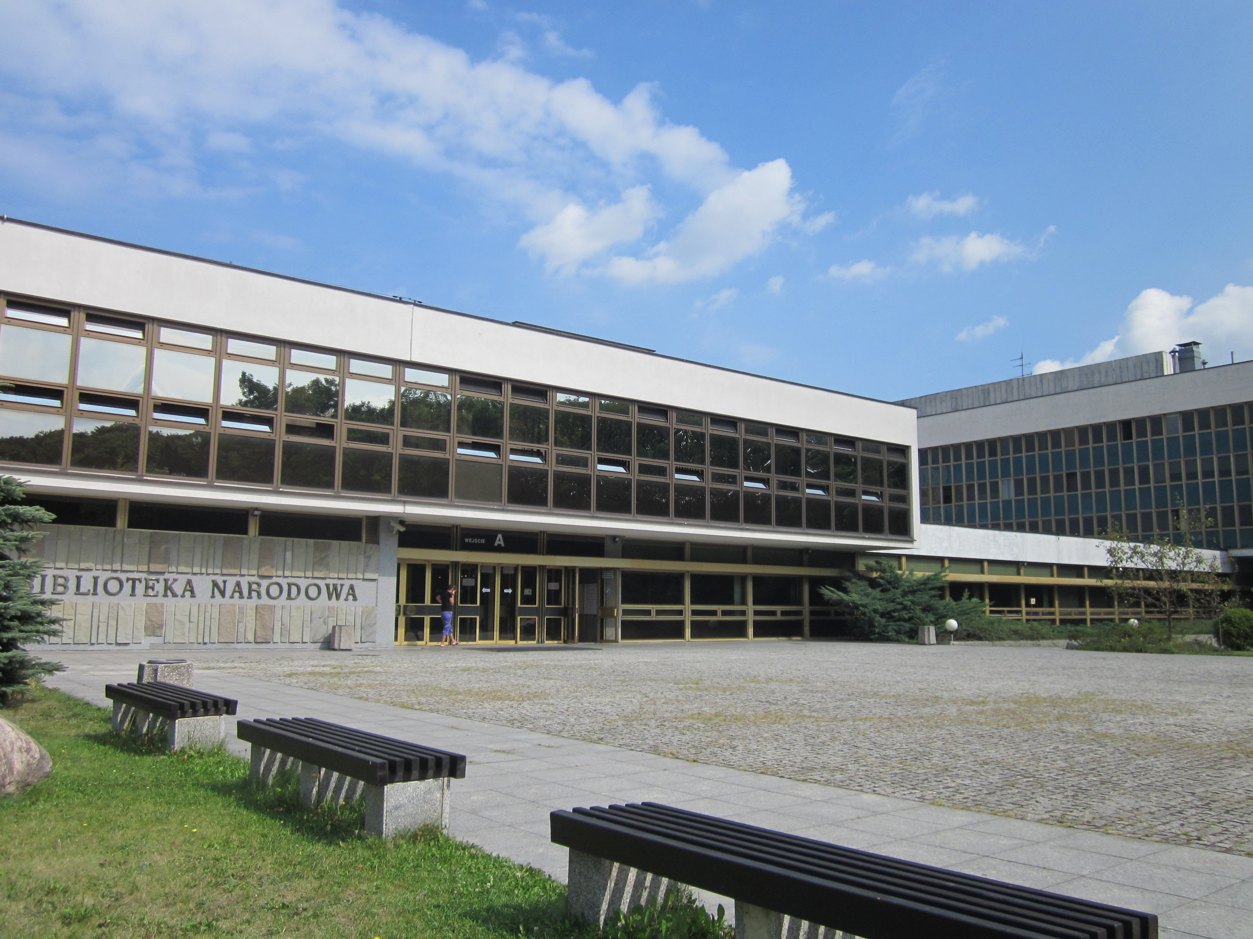 Budynek ten znajduje się przy al. Niepodległości 213.